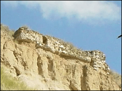 es el castill de canales